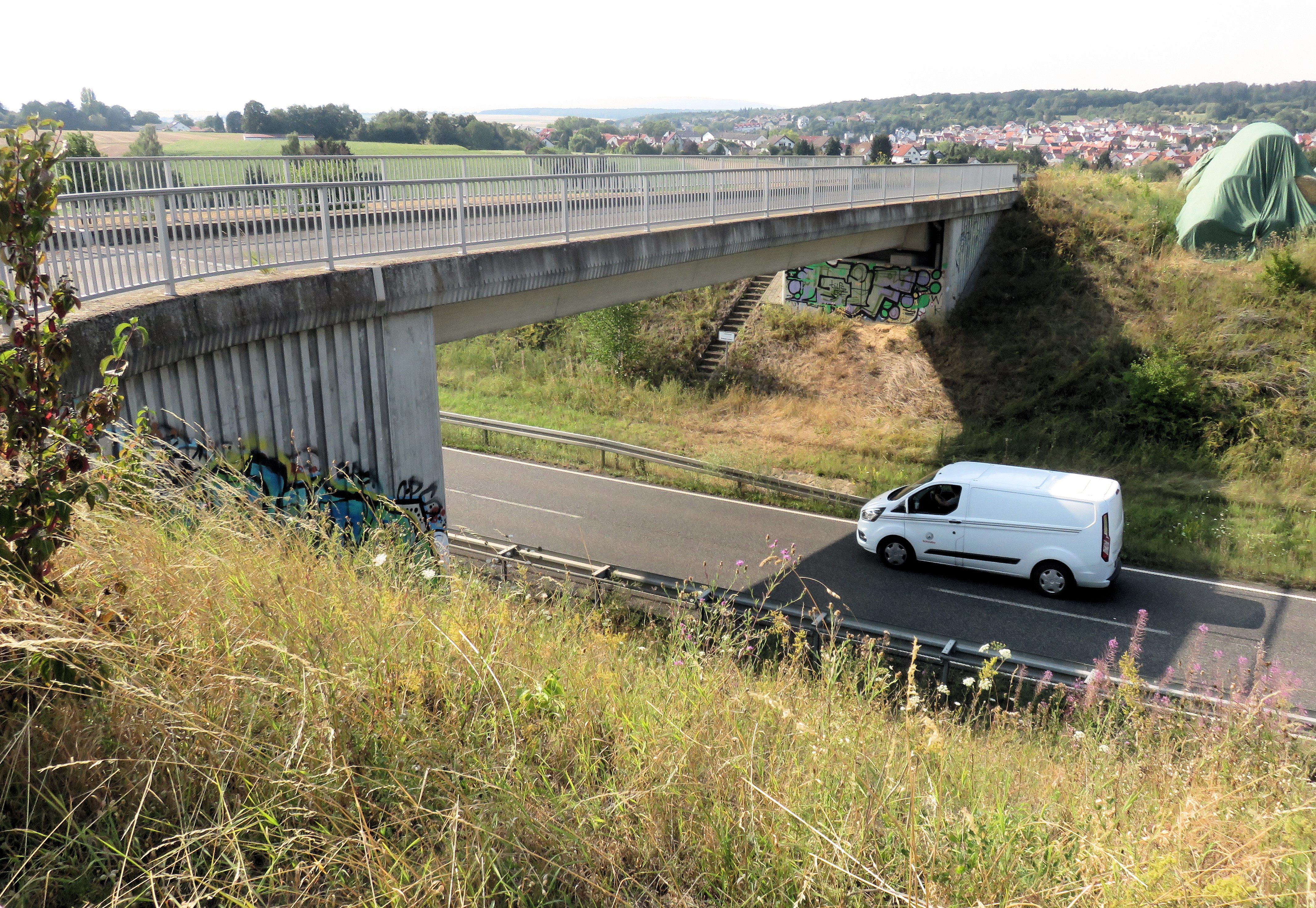 Brücke über die Ortsumgehung (Neuer Weg quert L 3008) bei Kilanstädten: Rechts neben dem jenseitigen Widerlager, zwischen Geländer und dem mit Planen abgedeckten Strohlager, befand sich die Grube, in der die Knochen der Opfer des “Massakers von Kilianstädten” gefunden wurden. 50° 11′ 33.91″ N, 8° 51′ 38.53″ E (50.192754°, 8.860701°)